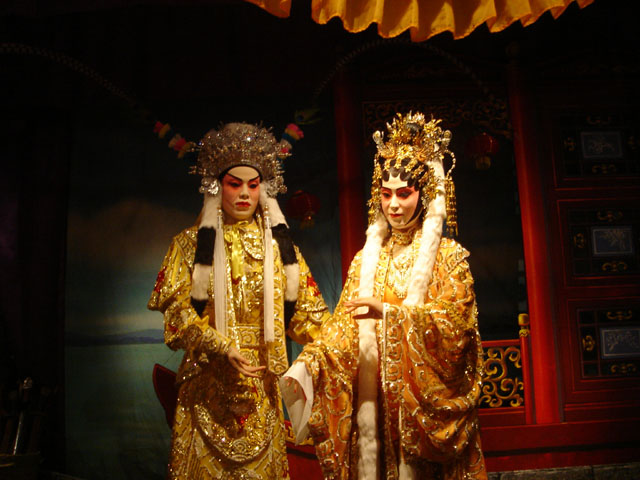 香港历史博物馆内的粤剧场景